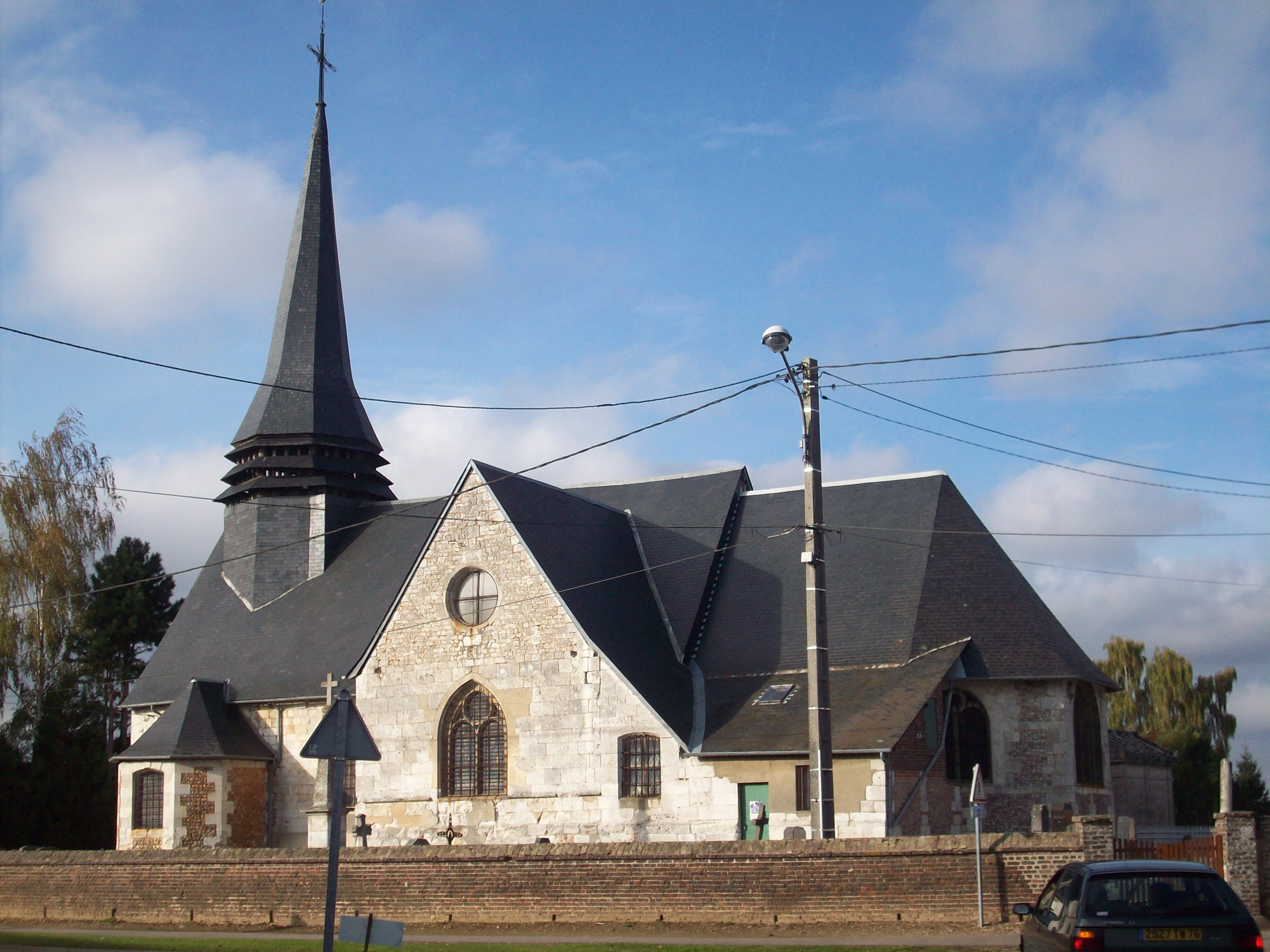 Eglise Saint-Sauveur de Boos.